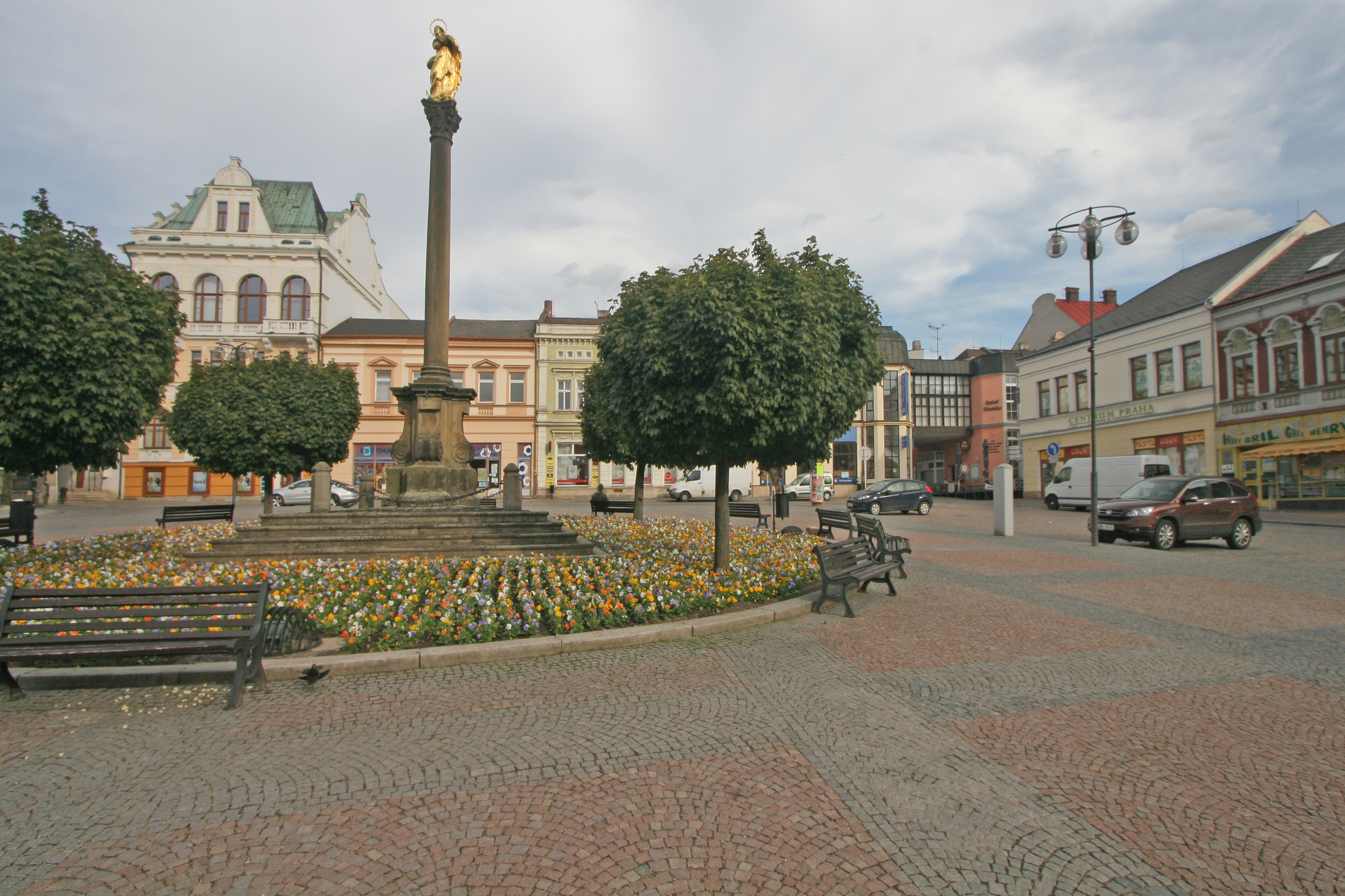 Socha Panny Marie, Ústí nad Orlicí, Mírové náměstí.